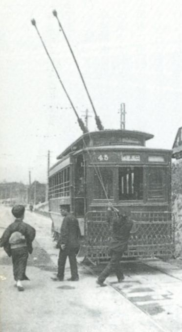 京都市電の蹴上終点で、1形の2本のトロリーポールを回す乗務員。行先は右書きで「仁王門」。